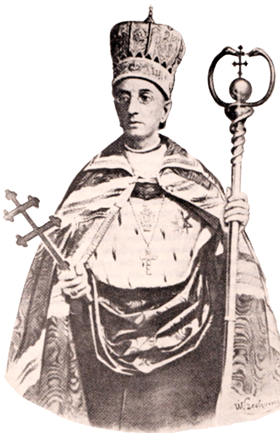 Єпископ УГКЦ, кардинал Католицької церкви, Митрополит Галицький, Архієпископ Львівський та Єпископ Кам'янецький Сильвестр (Сембратович).